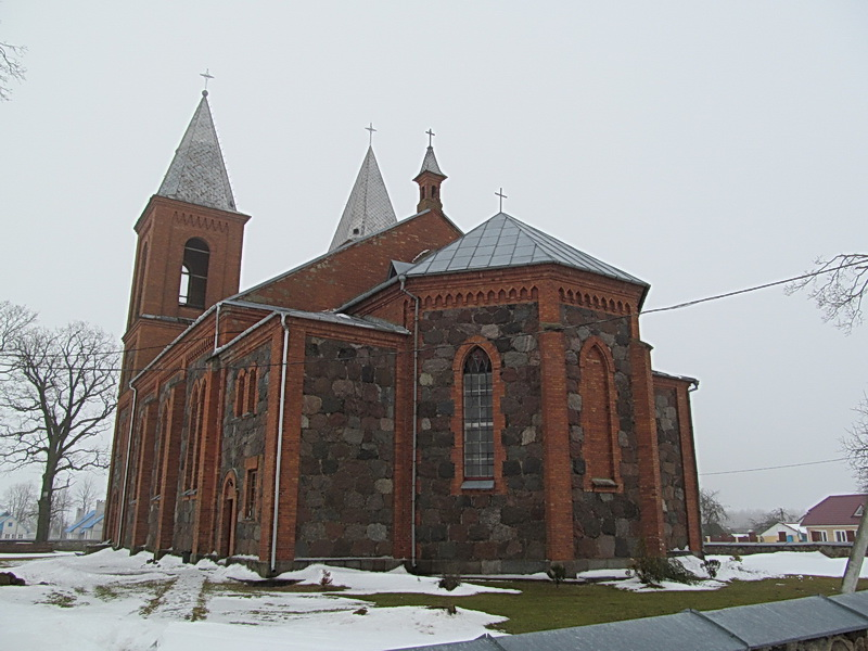 Лаздуны 1. Касцёл Святых Сымона і Тадэвуша